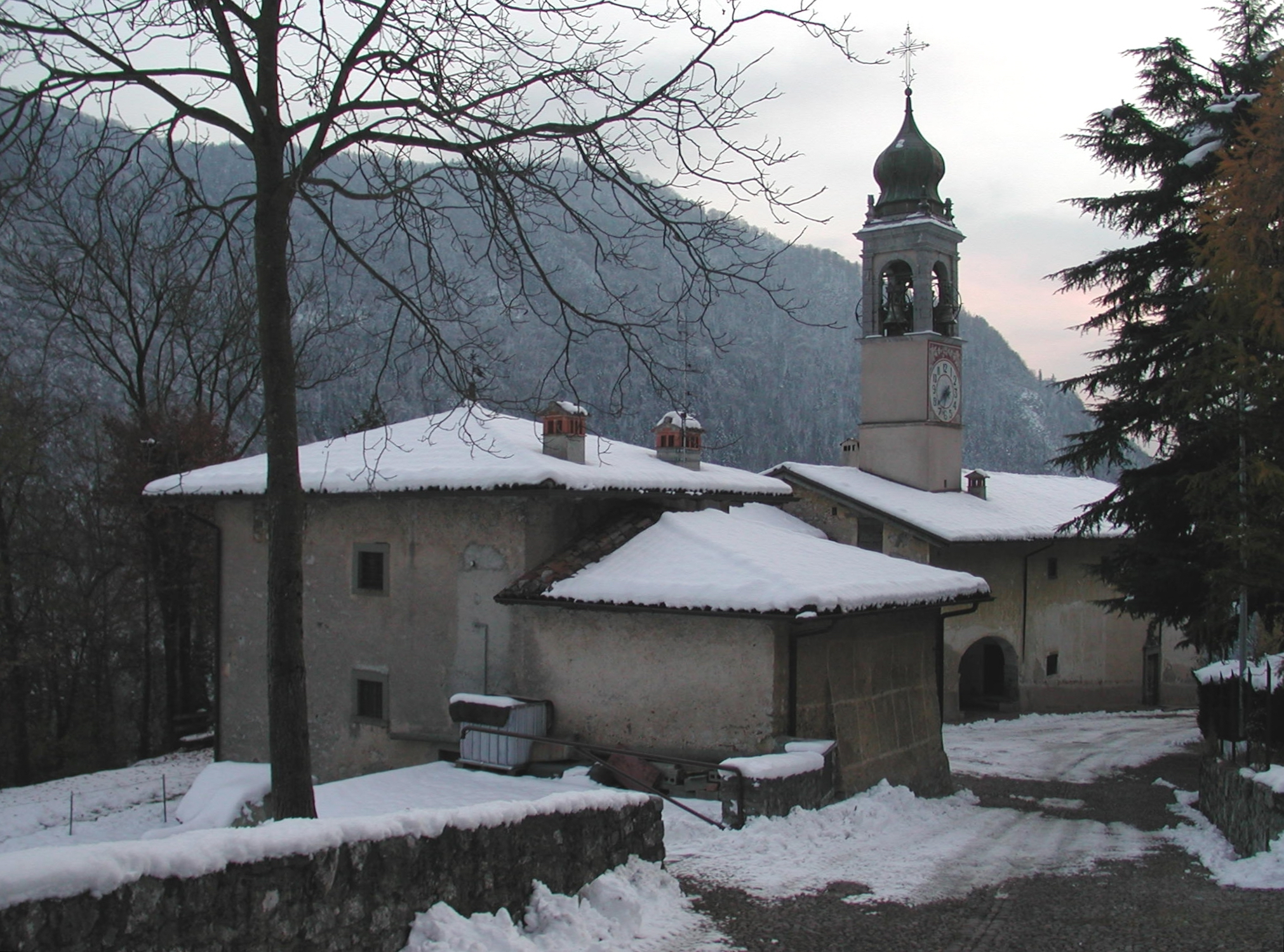 Chiesa parrocchiale di san Bernardo in Nasolino. Oltressenda Alta (BG), Italy